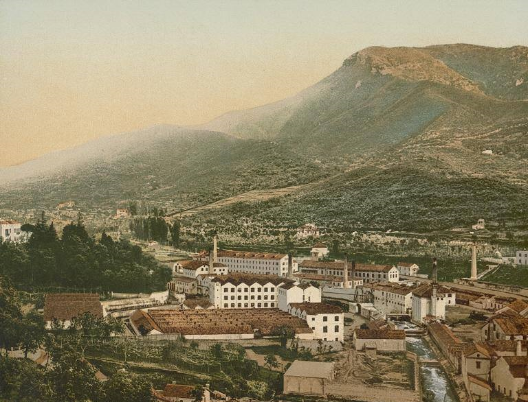 MCM a Fratte